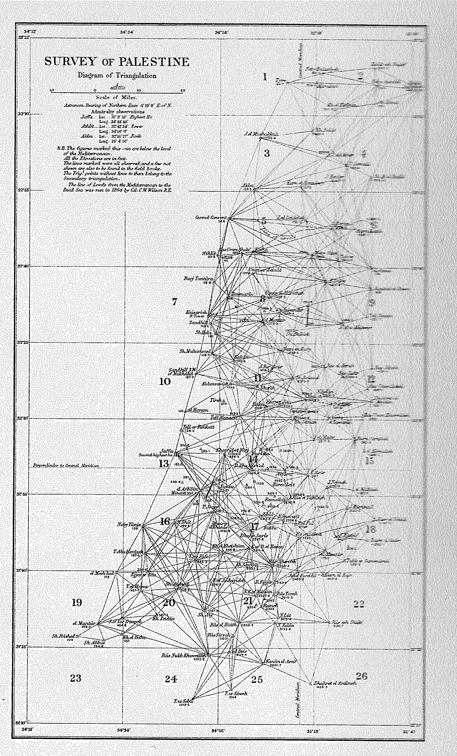 Palestine Exploration Fund Map - Triangulation network רשת טריאנגולציה במפה של הקרן לחקר ארץ ישראל. הקווים העבים הקצרים בריבוע 8 וריבוע 13 מסמנים את בסיסי המדידה